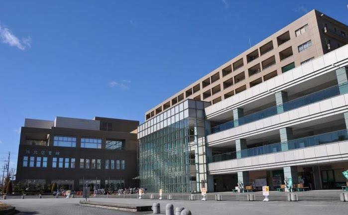 浜北区役所